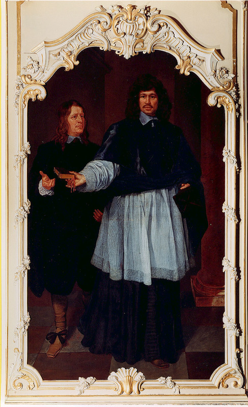 Le chanoine Jean-Baptiste d'Oultremont, (1606-1681) renonce à la vie cléricale après la mort de ses frères au combat, pour se marier à 64 ans et assurer une descendance à sa lignée.